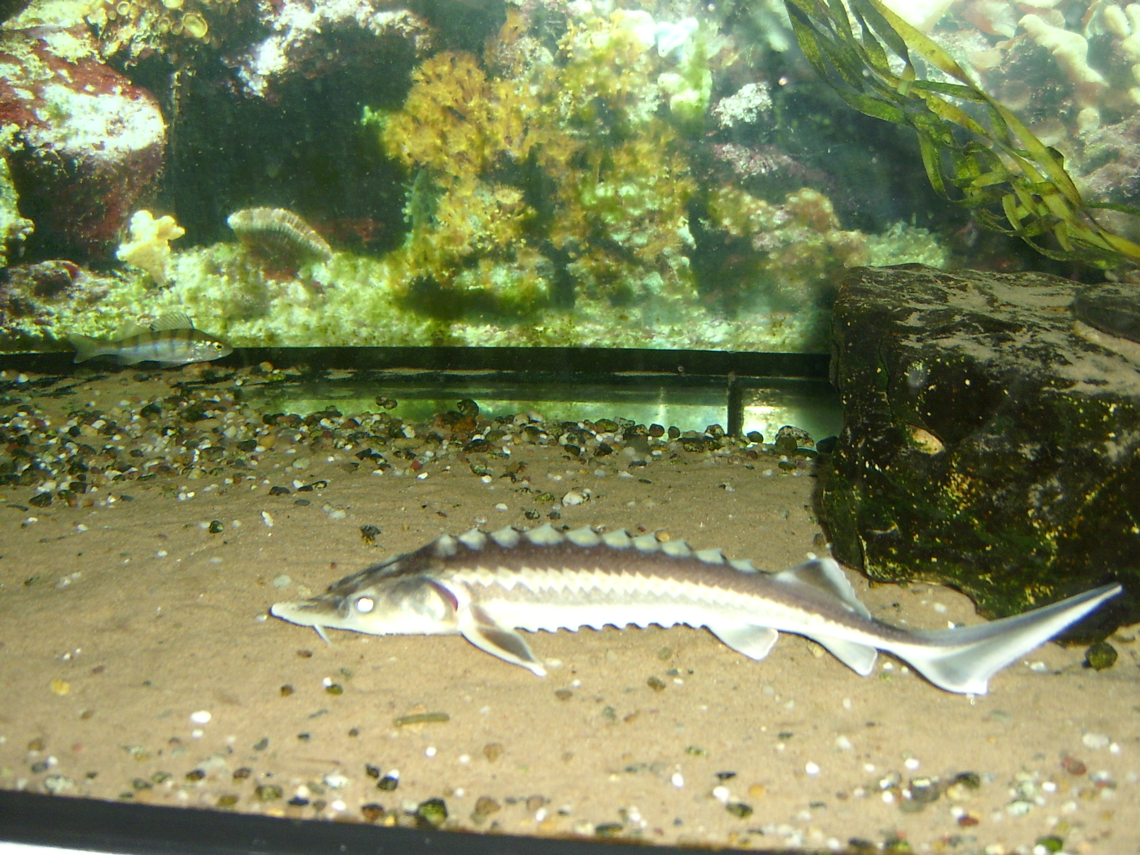 Waxdick (Acipenser gueldenstaedtii Brandt&Ratzeburg, 1833 )